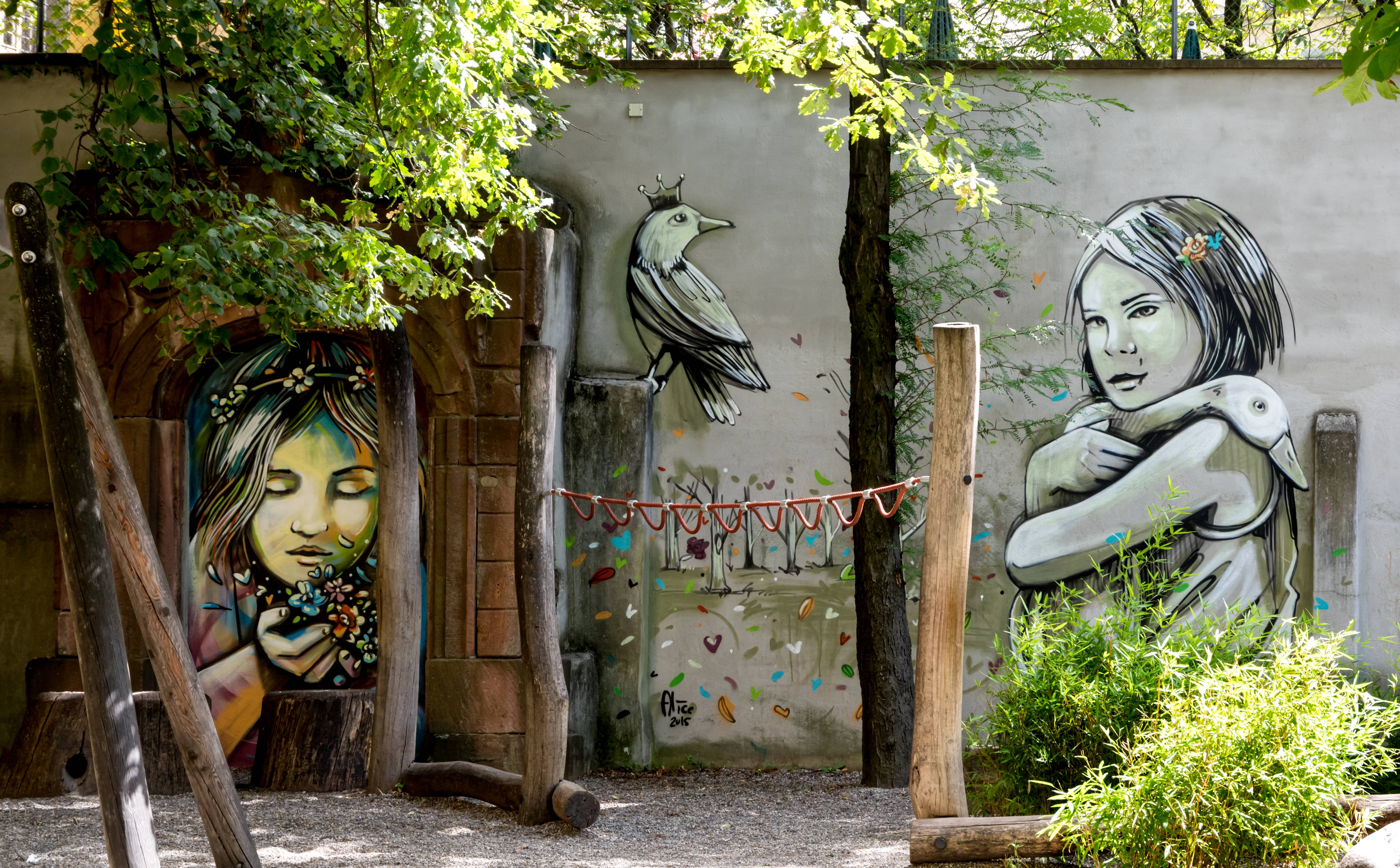 Die Street Art und Graffitikünstlerin Alice Pasquani aus Rom verschönert den Spielplatz am Augustinerplatz am 30. und 31. Juli 2015 im Auftrage des Vereins Kulturaggregat aus Freiburg.